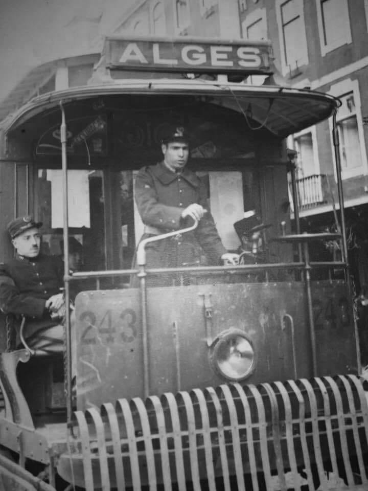 Kajuto de fruepoka lisbona tramo: deĵoras bremsisto kaj sidas unua-benke malantaŭ li du policanoj.